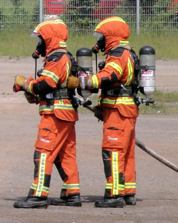 Feuerwehrschutzkleidung T-Rexs, Scott Atemschutzgerät, Interschutz 2010